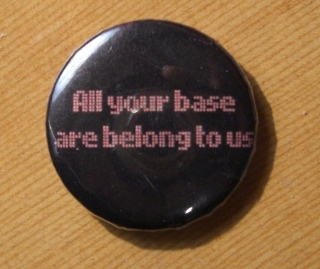 Chapa con la famosa frase "All your base are belong to us". Tomada por Jordi Vaca.